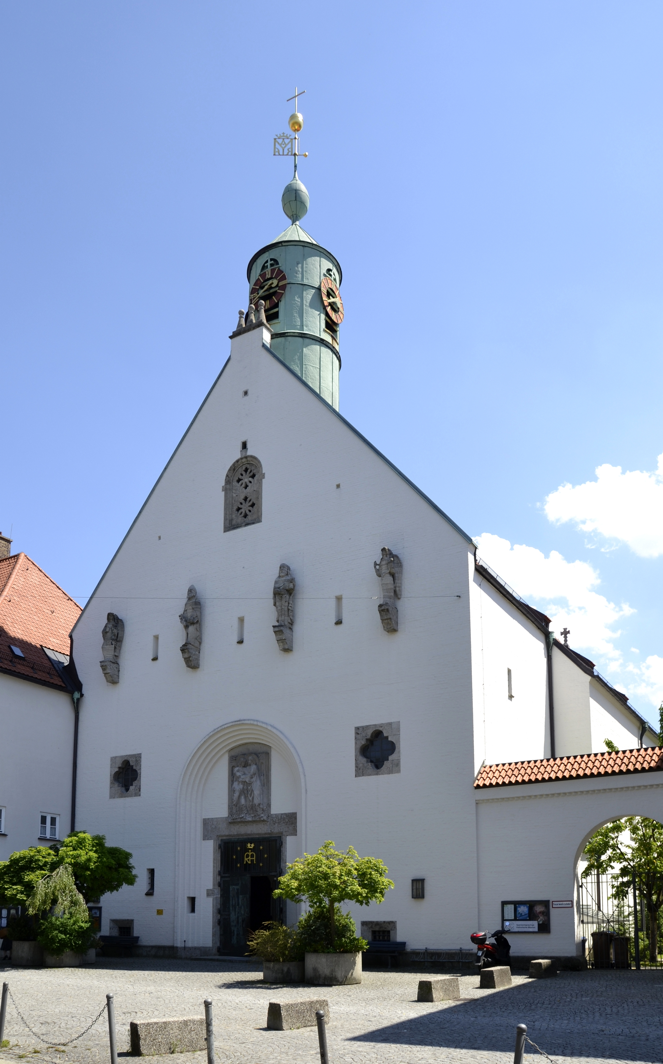 Die Mariä Heimsuchung im Münchner Stadtteil Schwanthalerhöhe.